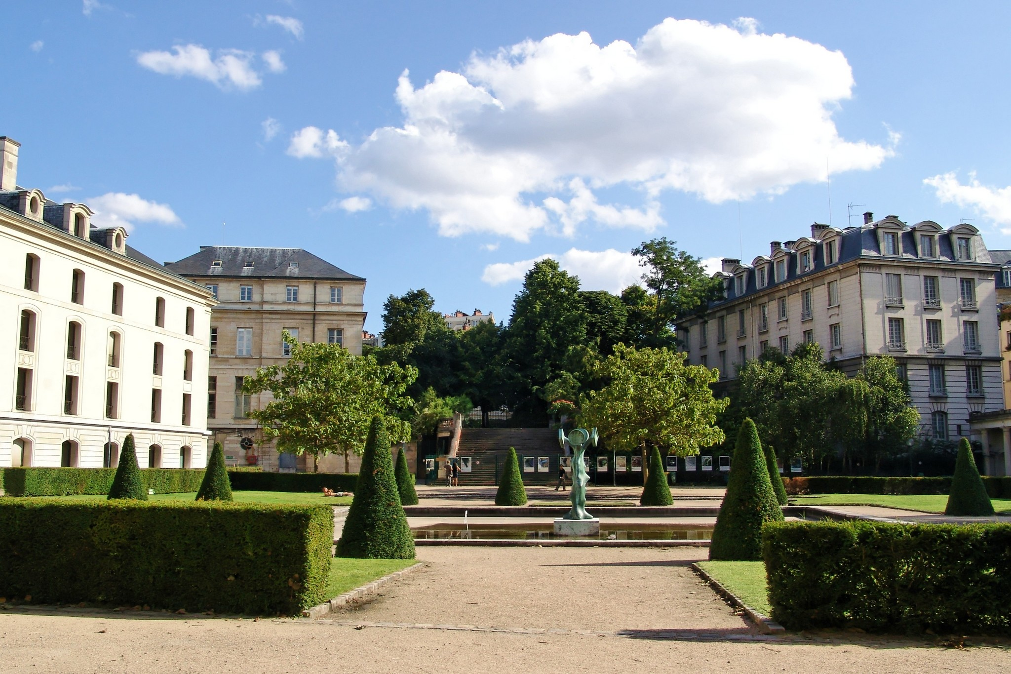 Jardin de l'ancienne école polytechnique de Paris (Paris 5 ième)